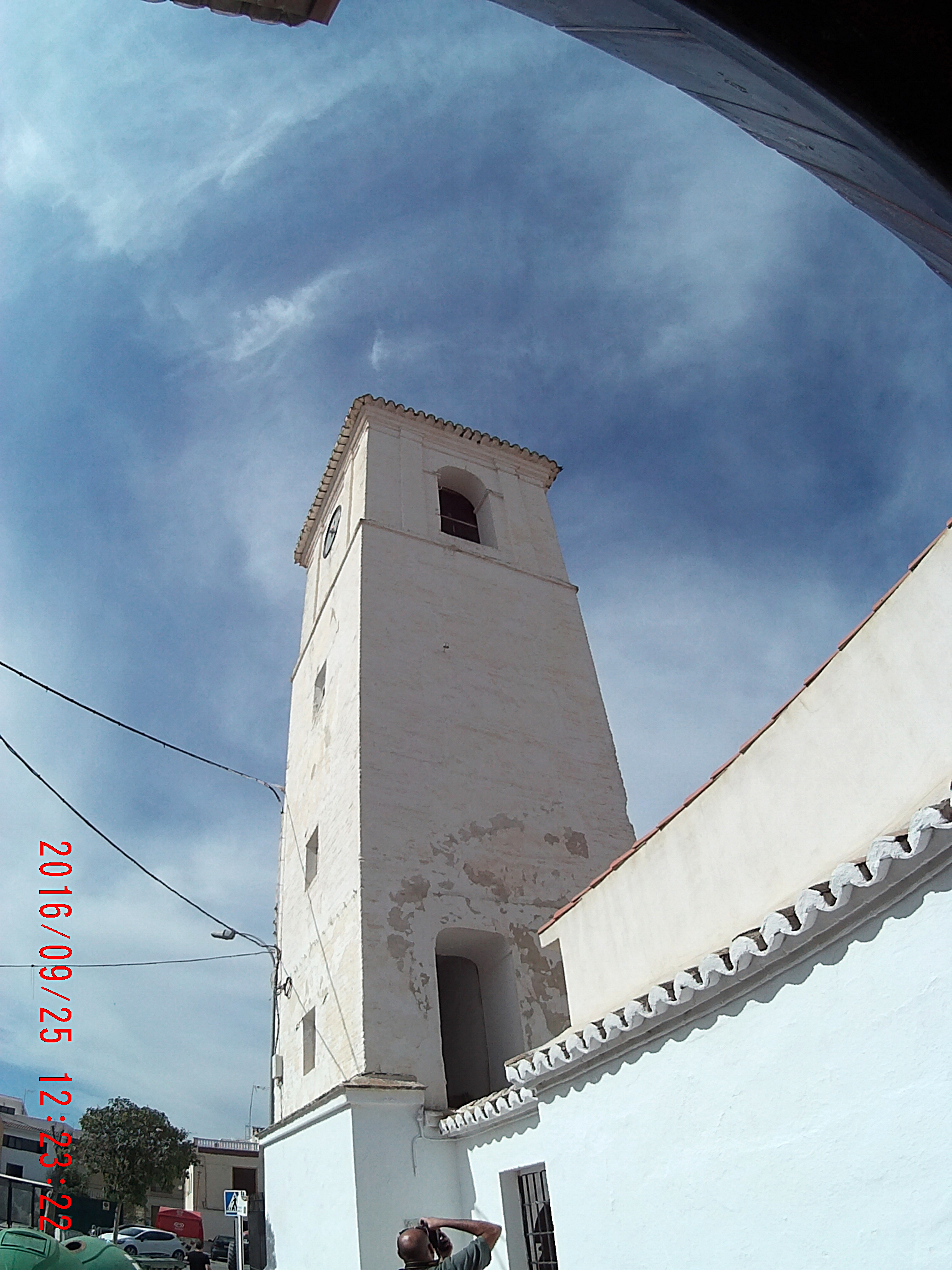 Iglesia Parroquial de la Inmaculada (La Malahá)